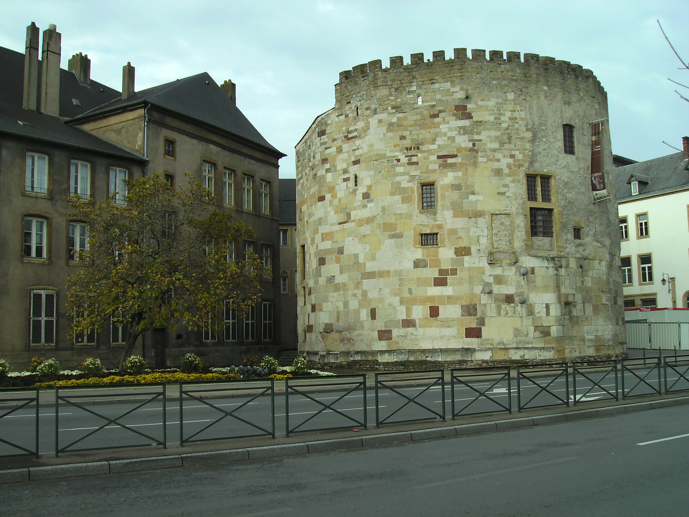 Thionville: Wehrturm neben dem Rathaus